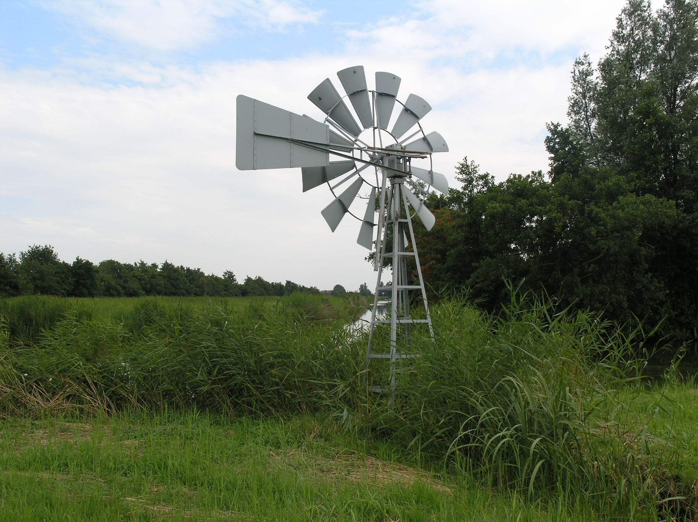 Nijetrijne Windmotor Poldermolen